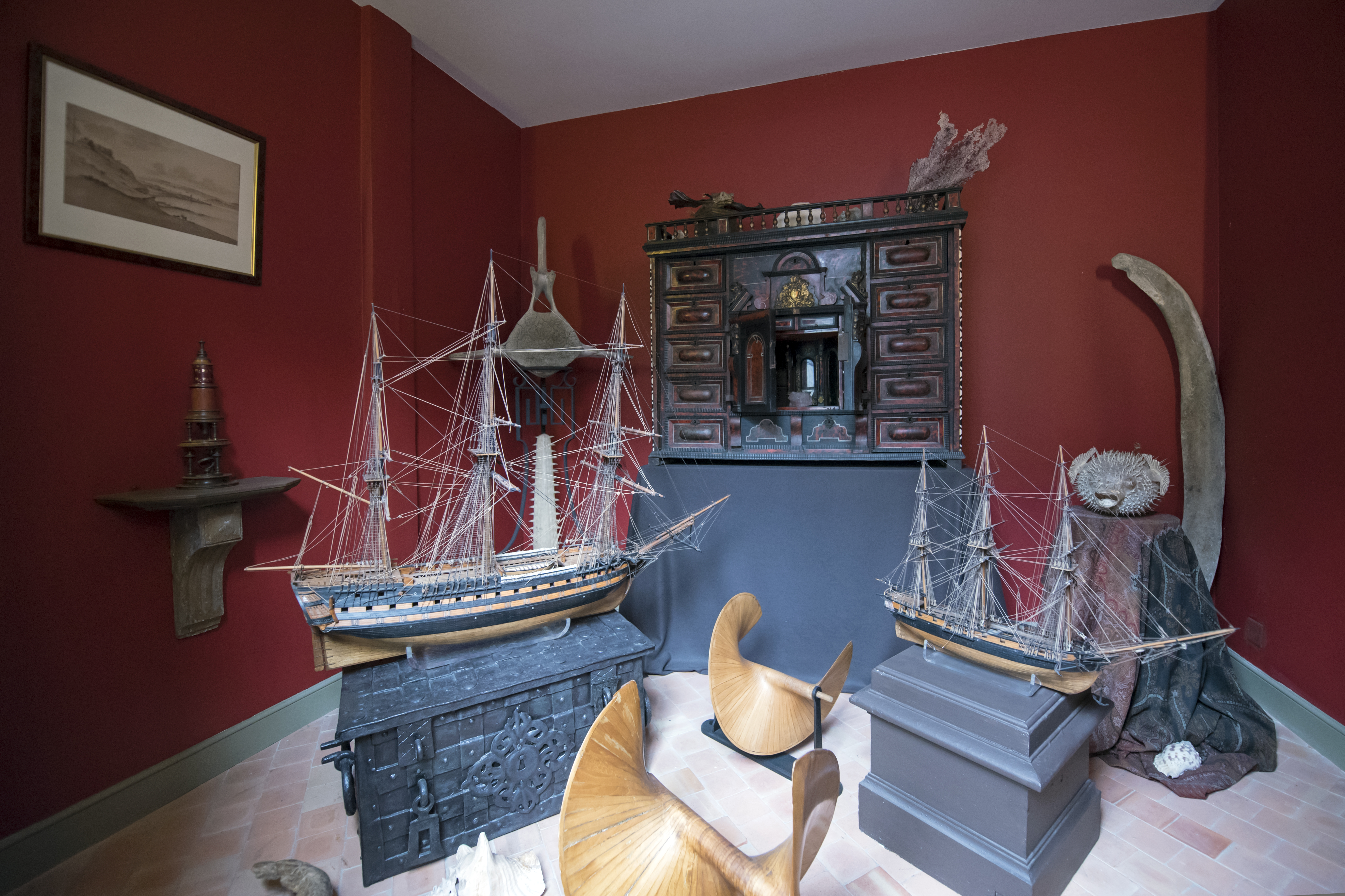 Maison de l'armateur, Le Havre, Seine-Maritime, 2017. .